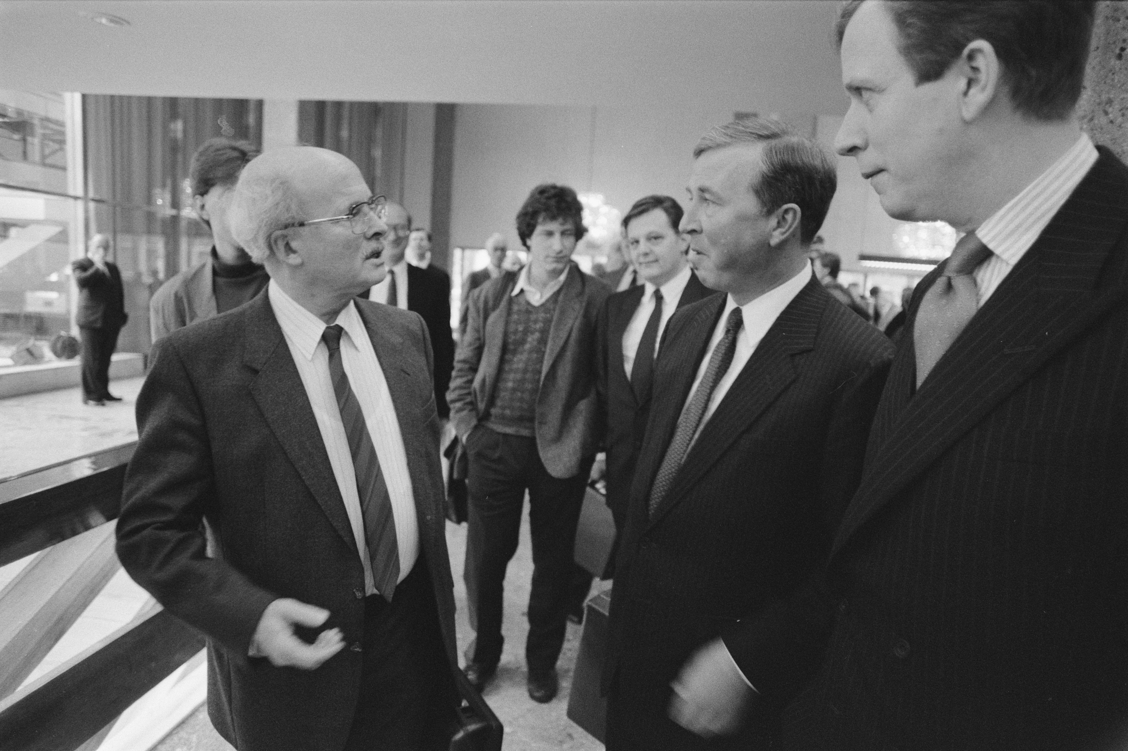 Collectie / Archief : Fotocollectie Anefo Reportage / Serie : [ onbekend ] Beschrijving : Rotterdam, aandeelhouders vergadering Nedlloyd; Noorse Torstein Hagen (m) in gespek met vz RvC Rein Wijkstra (l), rechts mr. Corpeleyn Datum : 25 januari 1988 Locatie : Rotterdam, Zuid-Holland Trefwoorden : vergaderingen, voorzitters Persoonsnaam : R. Wijkstra Fotograaf : Bogaerts, Rob / Anefo Auteursrechthebbende : Nationaal Archief Materiaalsoort : Negatief (zwart/wit) Nummer archiefinventaris : bekijk toegang 2.24.01.05 Bestanddeelnummer : 934-1755